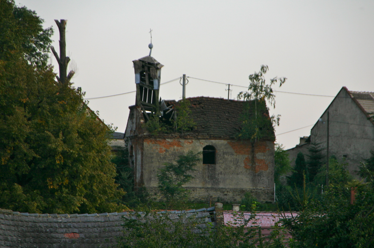 Czyżowice – wieś w Polsce położona w województwie opolskim, w powiecie prudnickim, w gminie Prudnik (kaplica (nr 44c), 1846 r.).